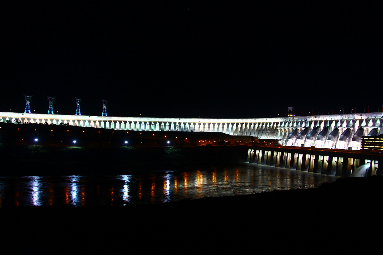 Itaipu à noite.